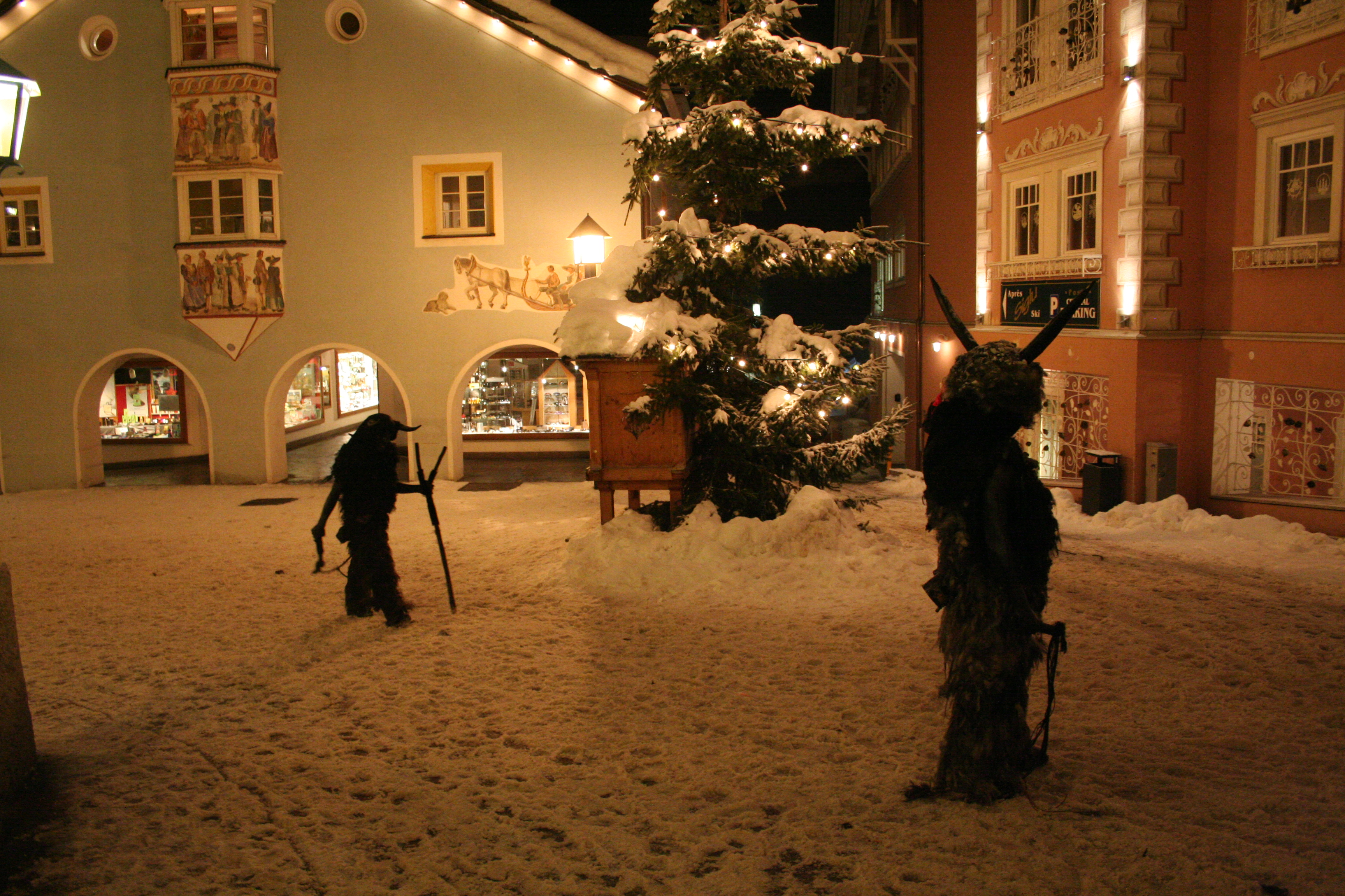 Krampustreiben im Zentrum von St. Ulrich in Gröden